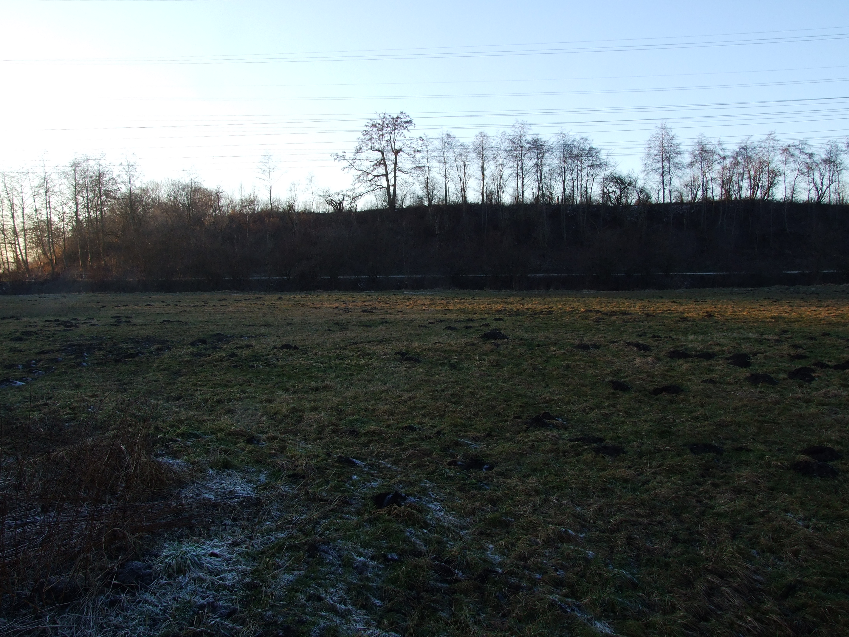 Planiedepot in Puchheim, aus SW gesehen